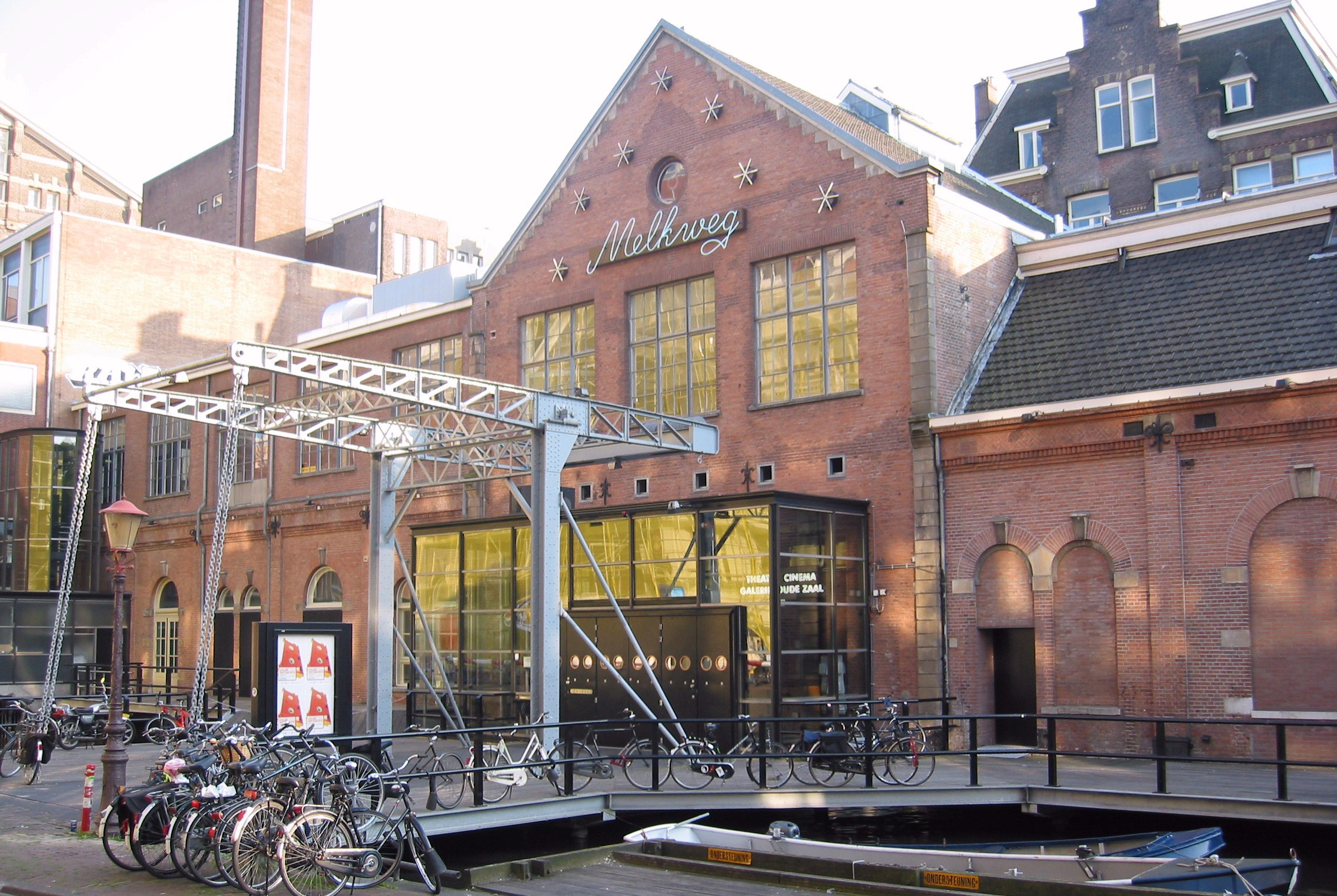 Music centre Melkweg in Amsterdam. Own photo, taken on 2004-07-28.